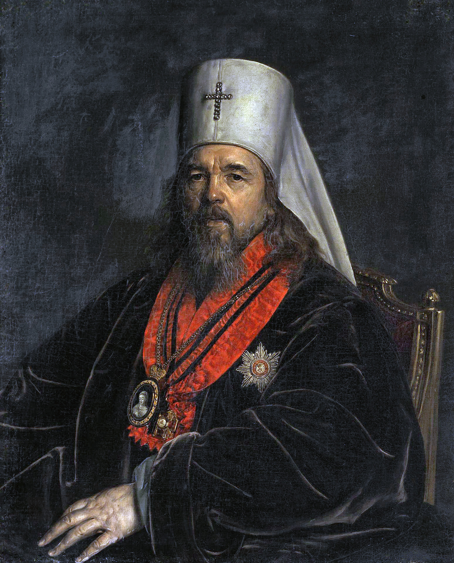 Portrait of Metropolitan Seraphim, whose secular name was Stefan Vasilievich Glagolevsky 1820